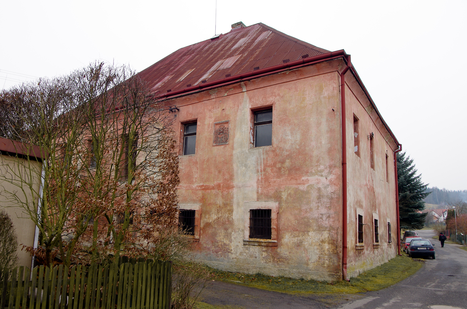 Tvrz (Šabina), Šabina 20